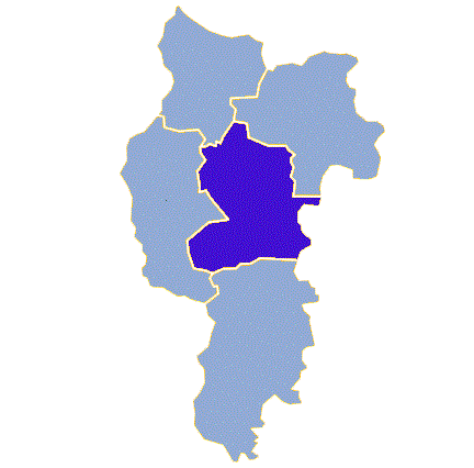 Powiat słubicki - Gmina Rzepin